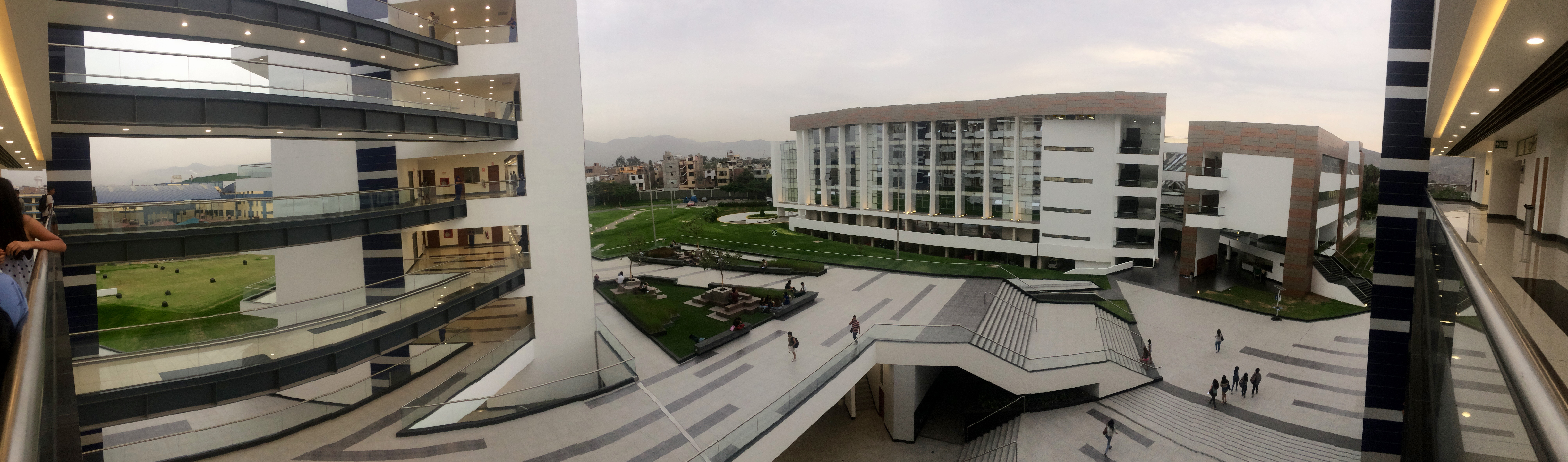 FOTO PANORÁMICA DE LA FCARRHH